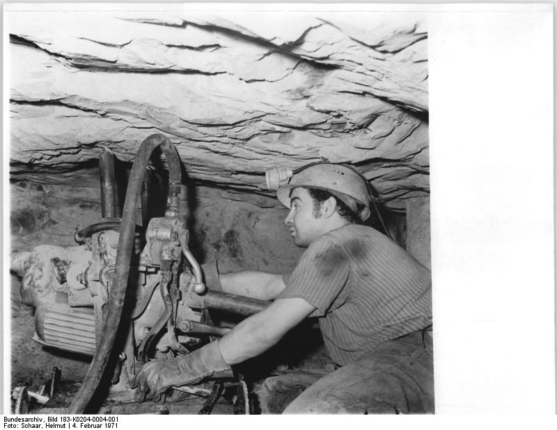 Mansfeld, Bergarbeiter bohrend Zentralbild Schaar 4.2.71 Bez.Halle-Mansfeld-Kombinat rationalisiert Kupferlinie-Ziel der Rationalsisierungsmaßnahemn, die die gesamte Kupferlinie von der Kupferschiefergewinnung über die Rohhüttenprozeß bis zur Veredlung erfaßt, ist den Mechanisierungsgrad im Abbau zu erhöhen und die Kosten zu senken. Mit der Gradstrebmethode beiten sich hierbei gute Möglichkeiten direkt an. Brigadeleiter Hans Schmidt bedient ein elektrisches Bohrgerät, dessen Einsatz mit dieser Methode auch unter ungünstigen geologischen Bedingungen möglich wird. (dazu auch K 0204-03-1N)